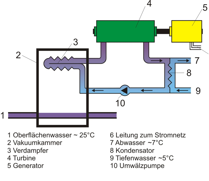 Schema eines hybriden Meereswärmekraftwerk; erste version, die eindeutig überarbeitet werden muss